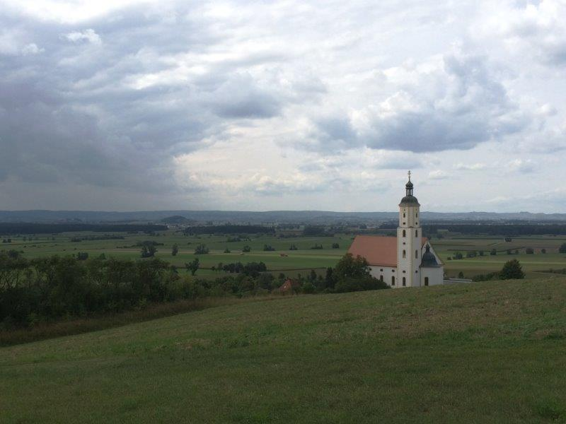 Maria Brünnlein mit Blick in das Ries